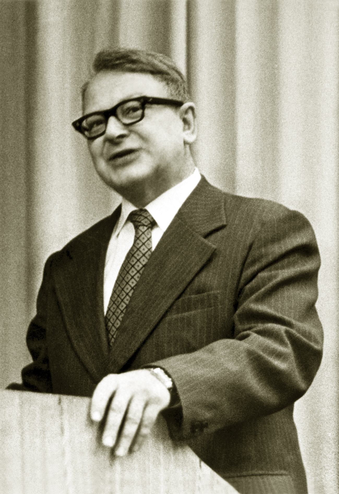 Проректор по научной работе ЛПМИ, доцент Олег Феодосьевич Тарасов